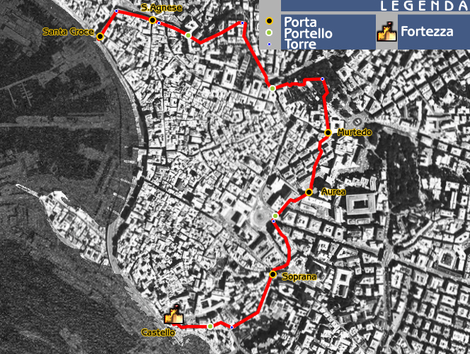 Muros de Génova (Italia)